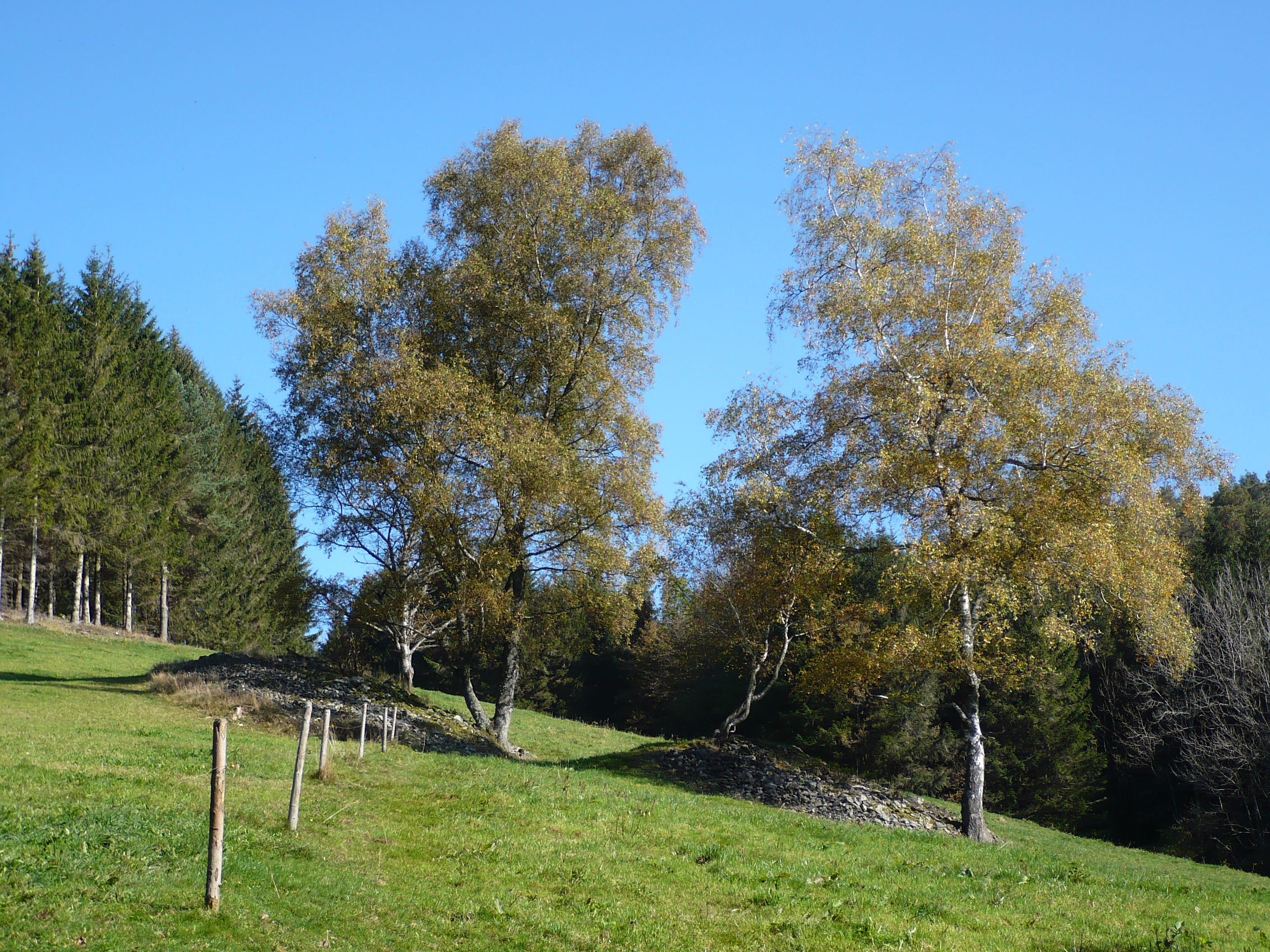 Überreste des als Mühlgraben verwendeten Urgrabens